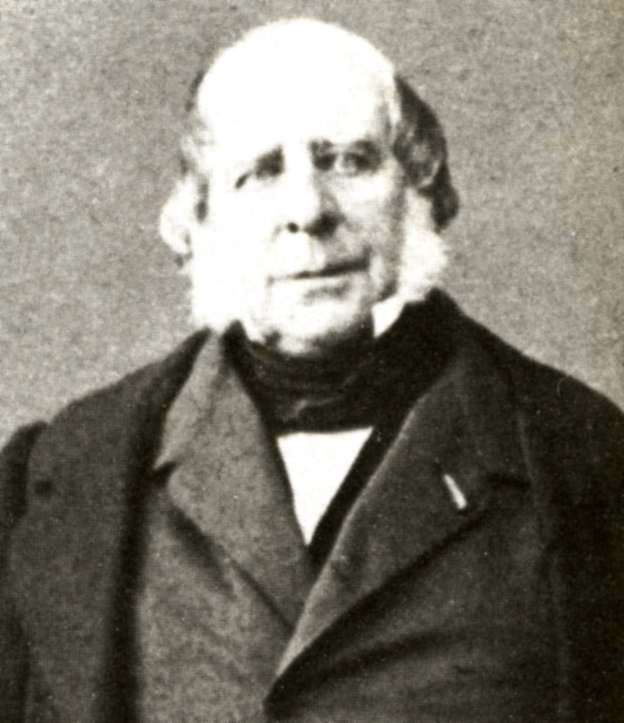 Ulric Guttinguer (1787–1866), poète et romancier français.